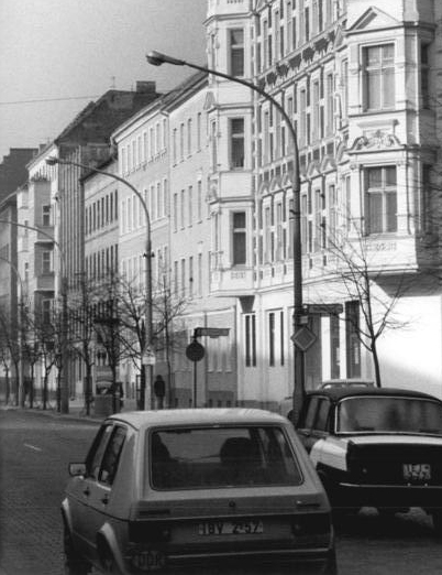 Title: Berlin, Wilhelm-Pieck-Straße, renovierte Häuserfassaden Factual corrections and alternative descriptions are encouraged separately from the original description. Additionally errors can be reported at this page to inform the Bundesarchiv. Original historic description: ADN-ZB-Settnik-18.2.84-kb-Berlin: Rekonstruierte Häuserfassaden verschönern das Antlitz der Wilhelm-Pieck-Straße. Im Berliner Stadtbezirk Mitte verbesserten sich im Vorjahr durch Modernisierung, Instandsetzung und Rekonstruktion von Wohnungen für über 3500 Familien die Lebensbedingungen. 1984 sollen weitere 1674 Wohnungen mit modernem Komfort ausgestattet werden.